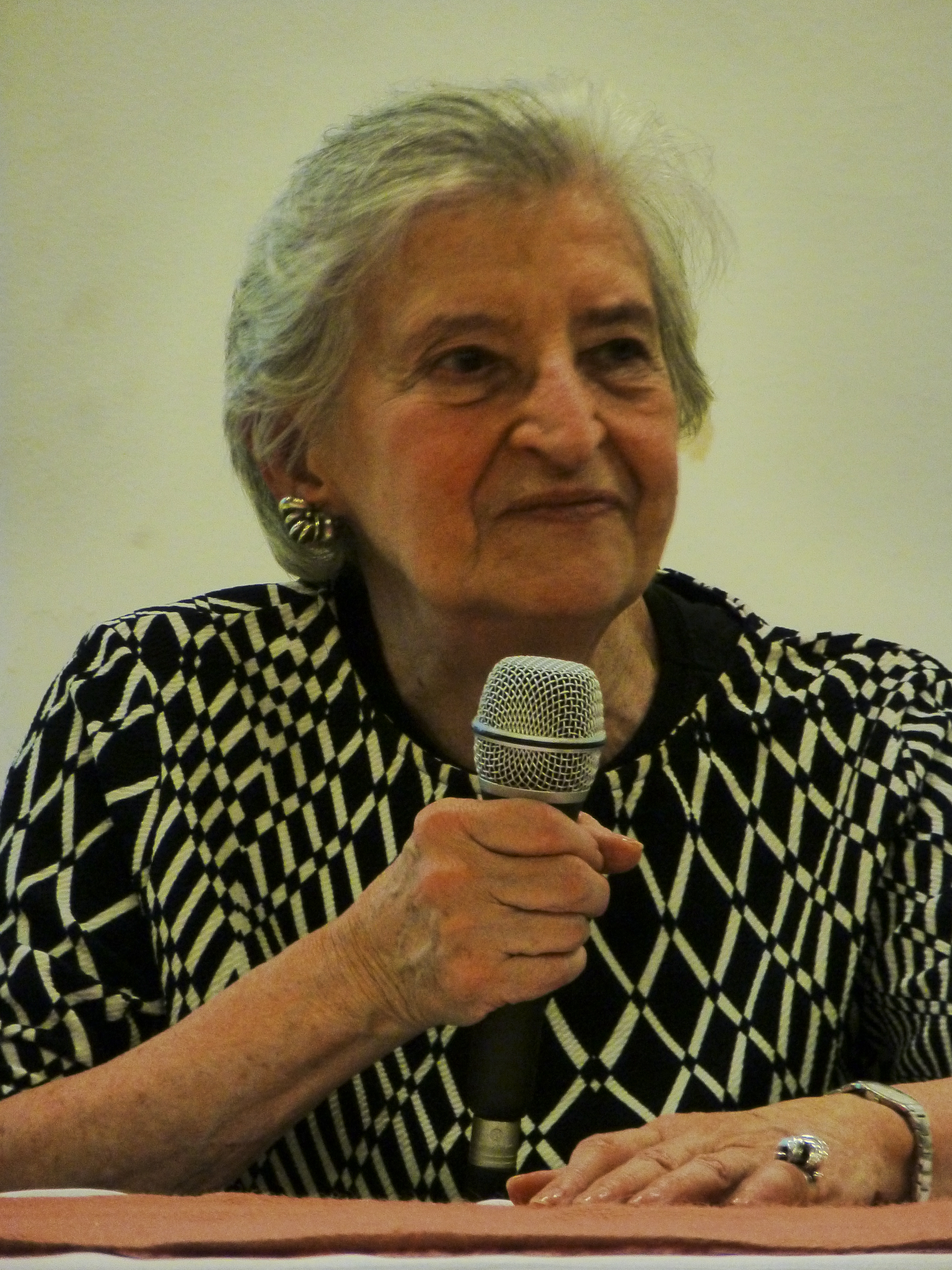 Rosa Grena Kliass, arquitecta y paisajista brasileña